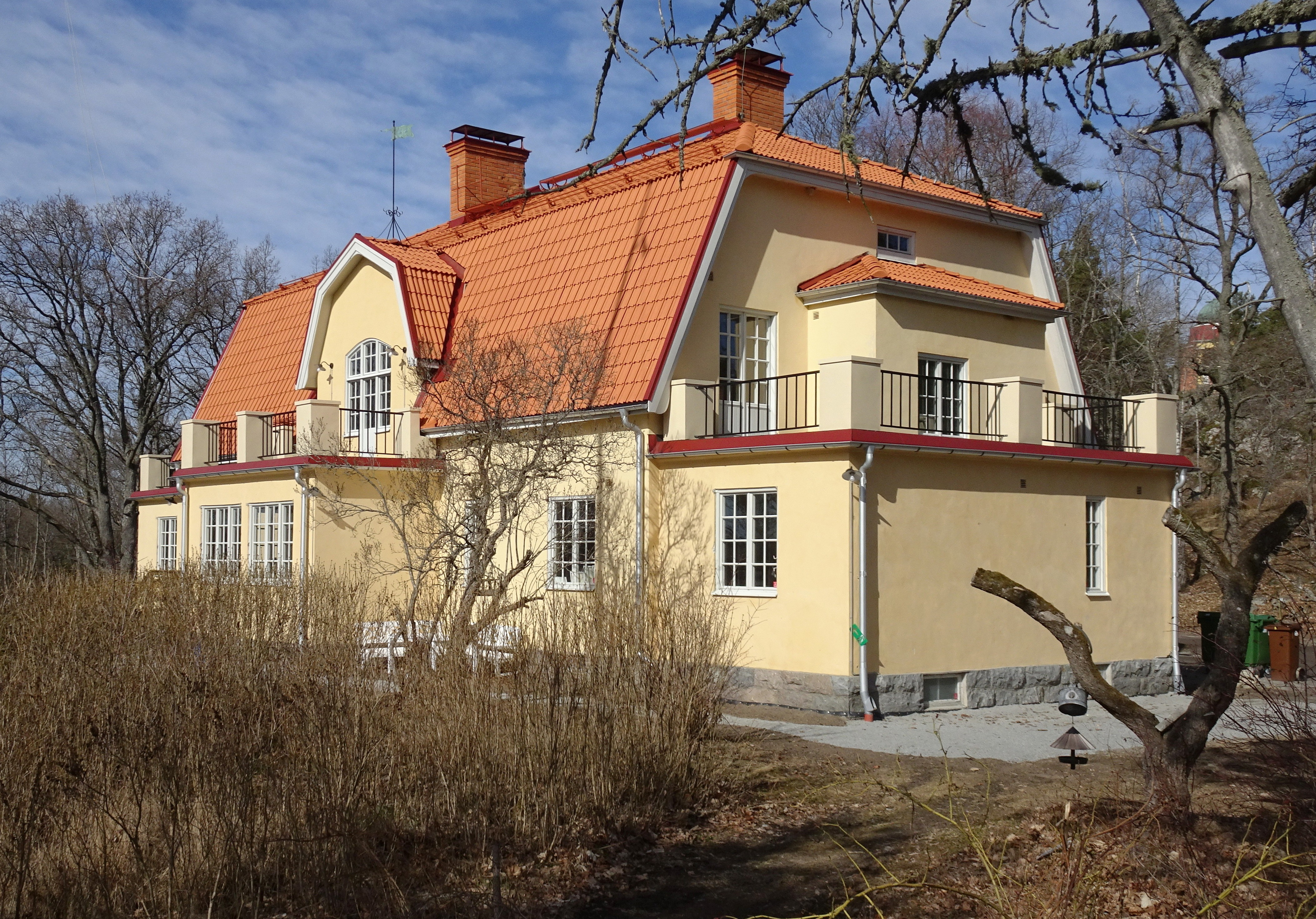 Kvistabergs gård, huvudbyggnad